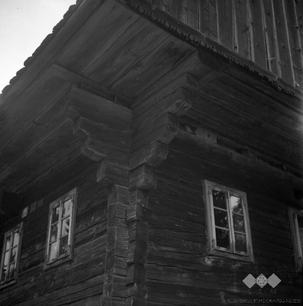 Vogal Hrasnikove hiše, Hudinja.